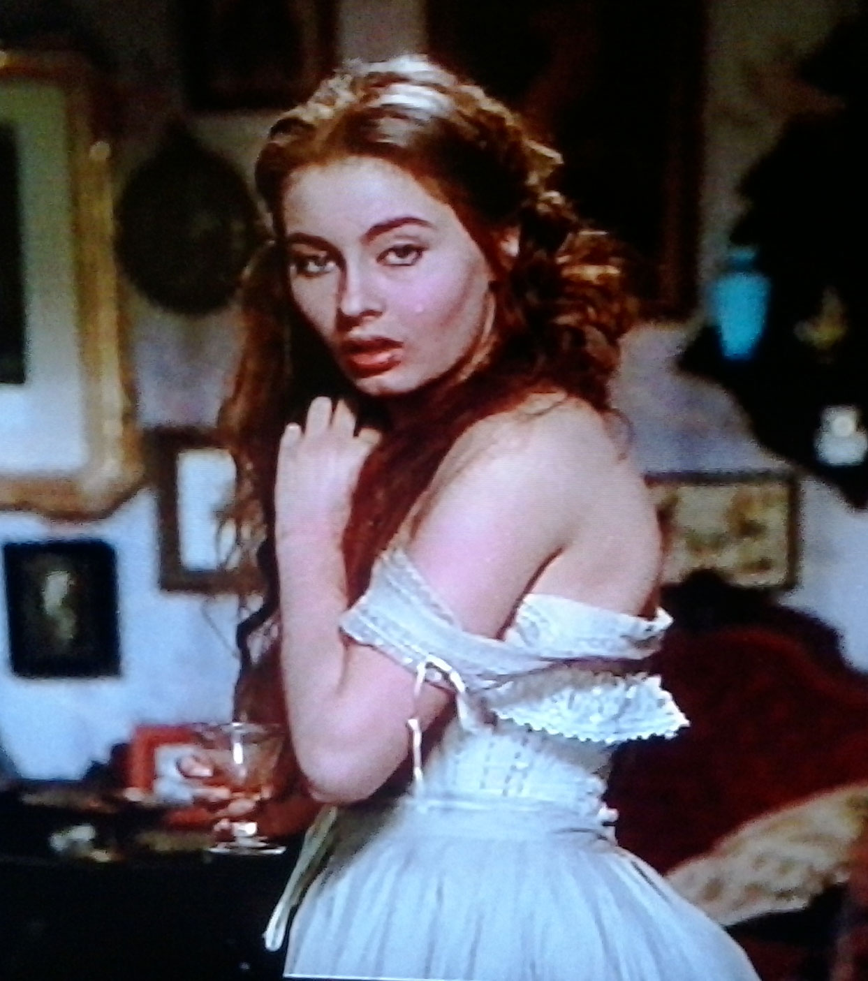 Marcella Mariani nel film di Visconti "Senso"-1954